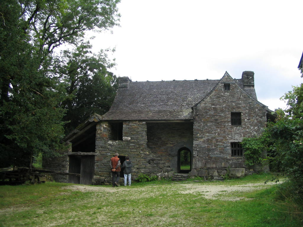 Maison Cornec à St Rivoal, Finistère, France